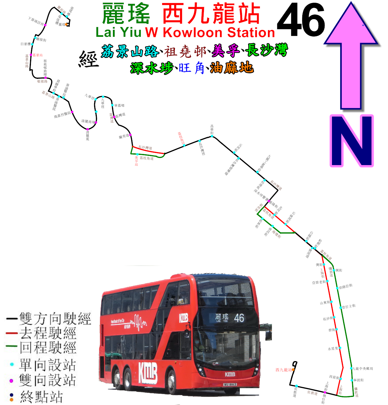 中文（香港）: 九巴46線的走線圖